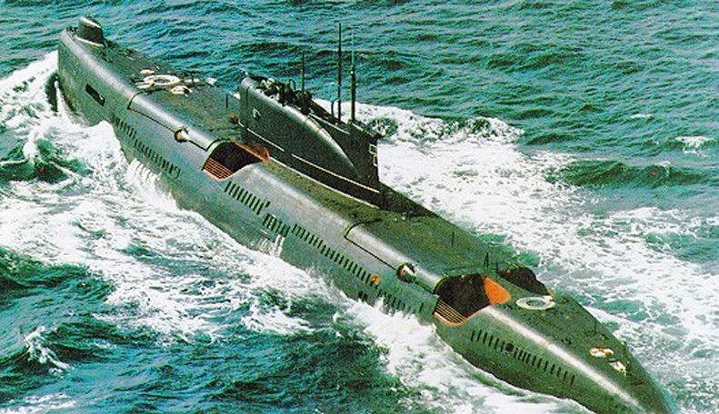 Ein sowjetisches SSG vom Typ Juliett. en: Soviet Juliett class guided missile submarine